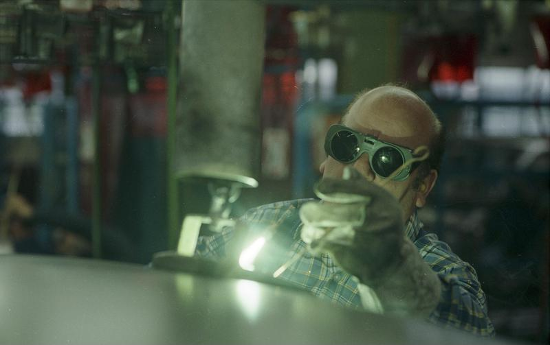 Juni 1988 Stuttgart-Untertürkheim, Daimler-Benz-Werk